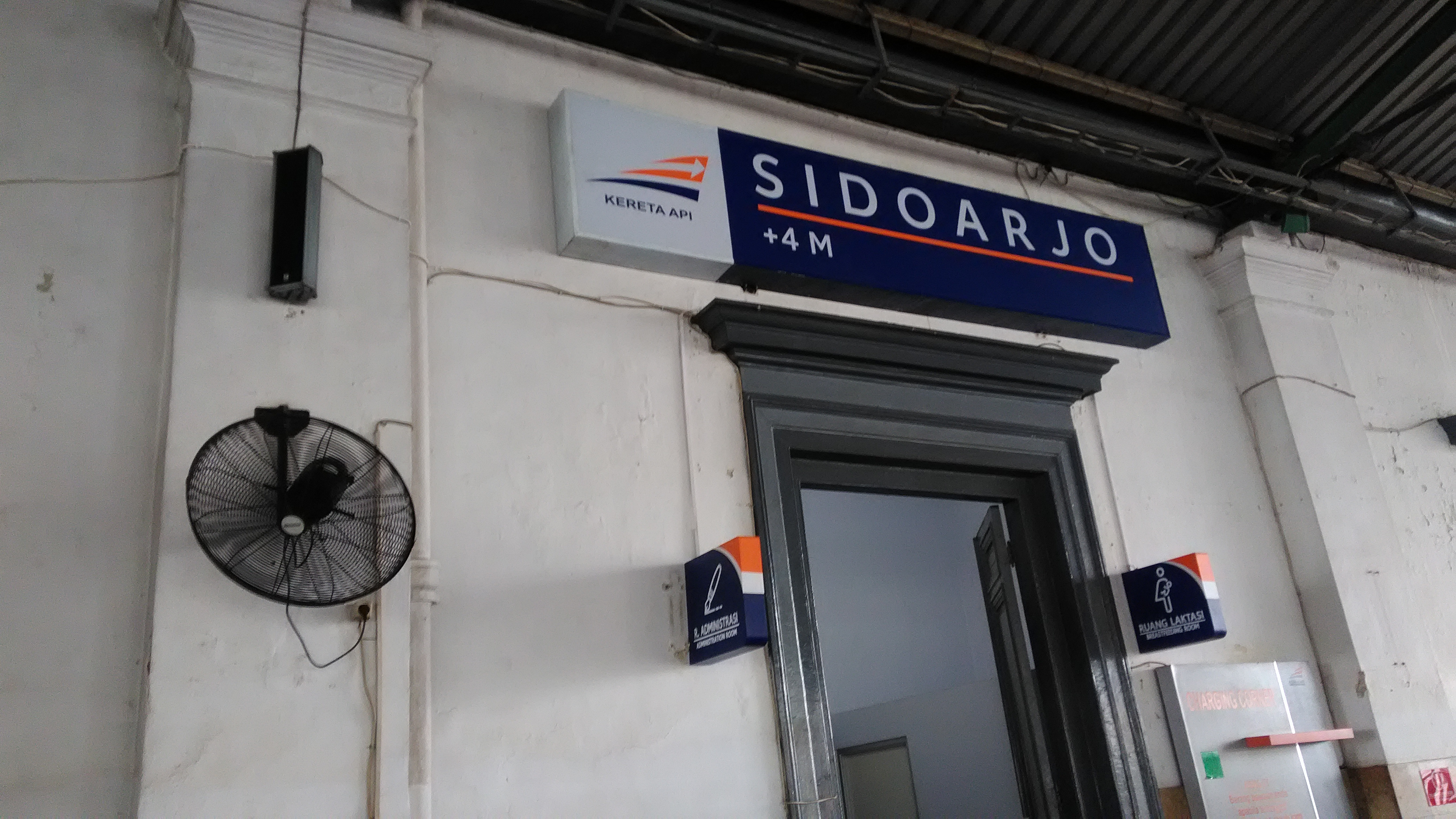 Stasiun Sidoarjo dengan Papan Nama Terbaru versi 2017